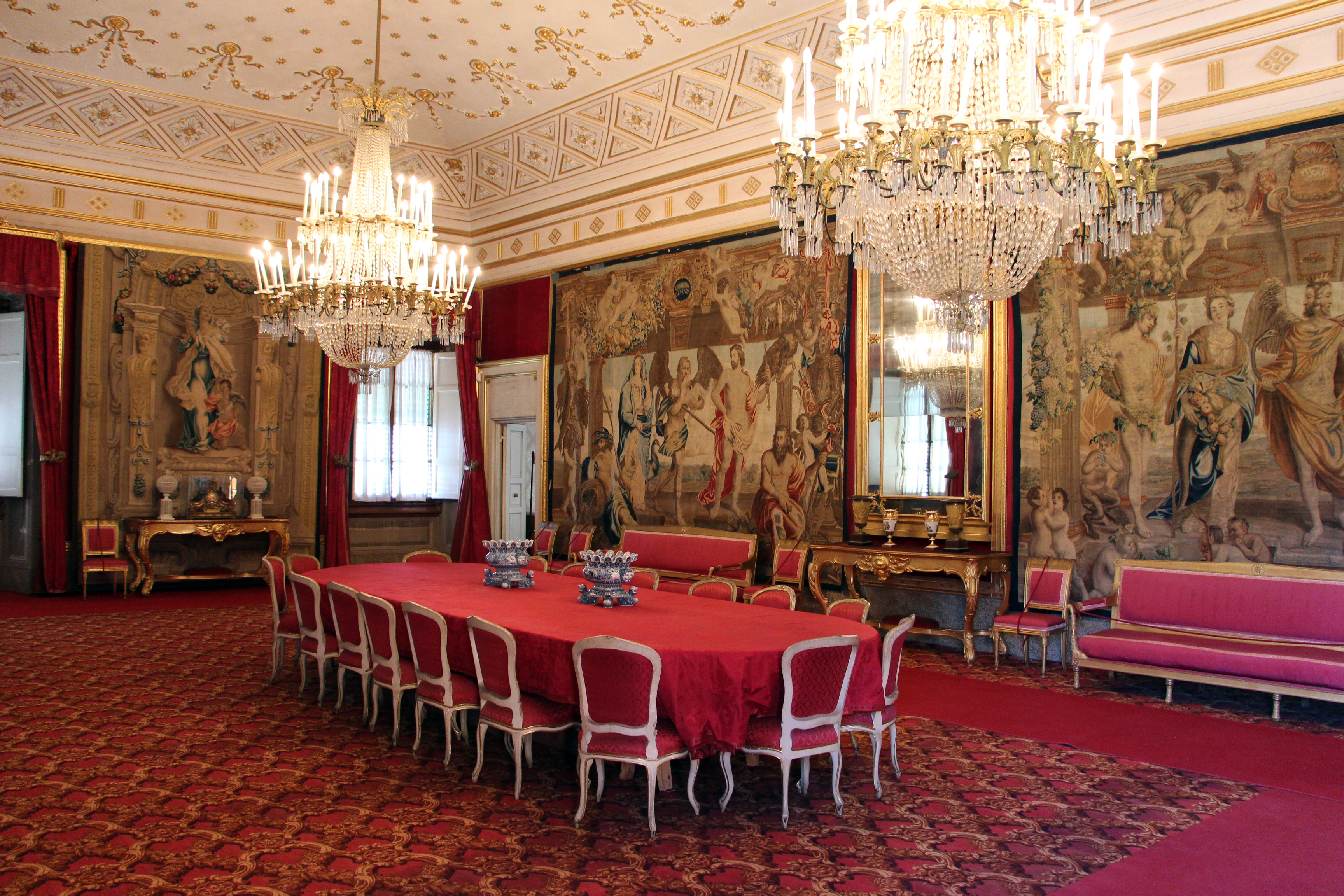 Villa medicea della Petraia - MIBAC This is a photo of a monument which is part of cultural heritage of Italy.